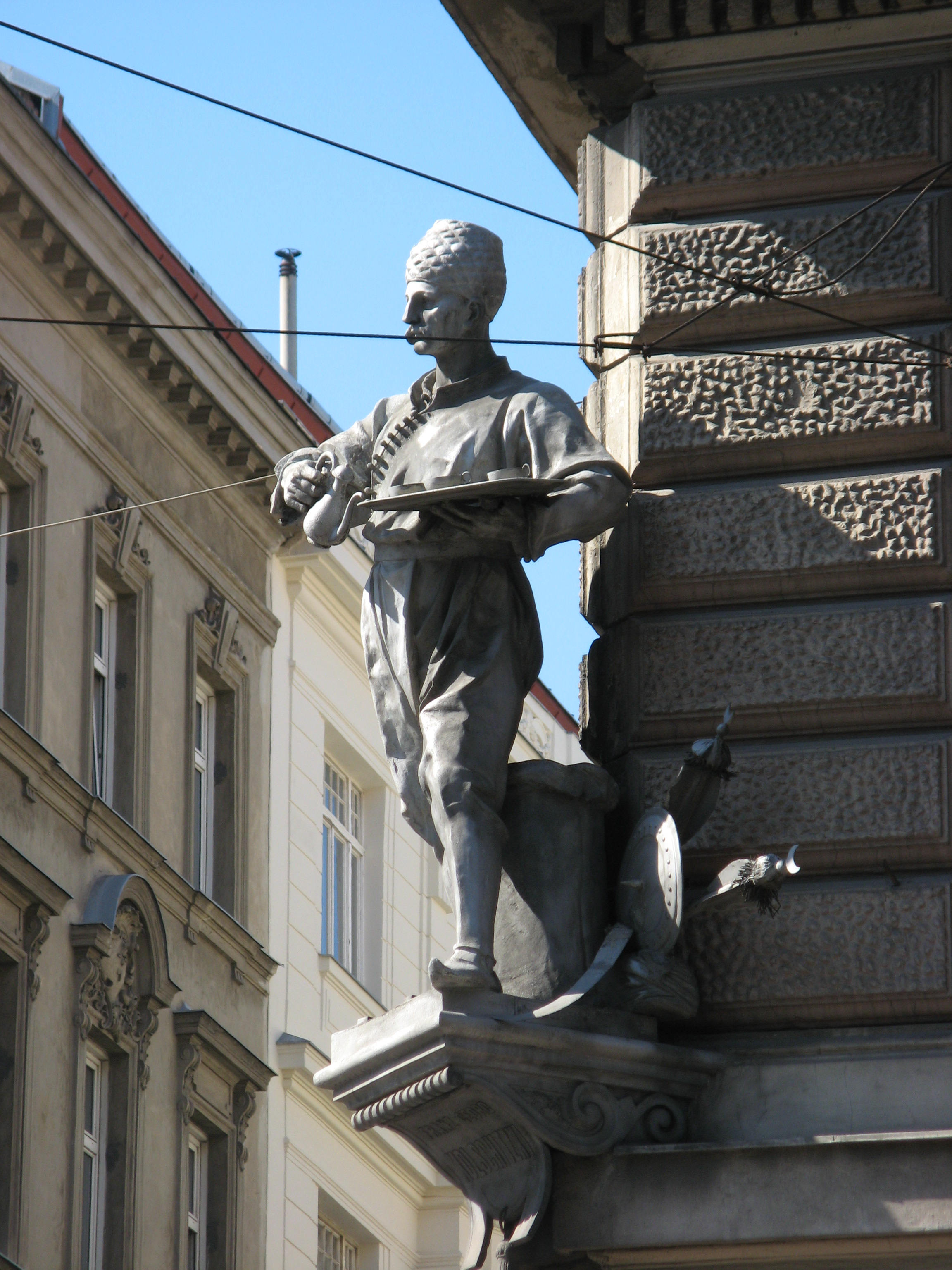 Kolschitzky-Denkmal (1885) von Emanuel Pendl, Kolschitzky Gasse 2-4, Ecke Favoritenstraße 64, Wien-Wieden